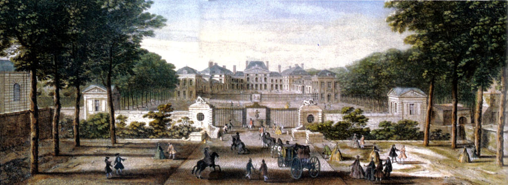 Le château de Sceaux, meilleur bordel de Versailles